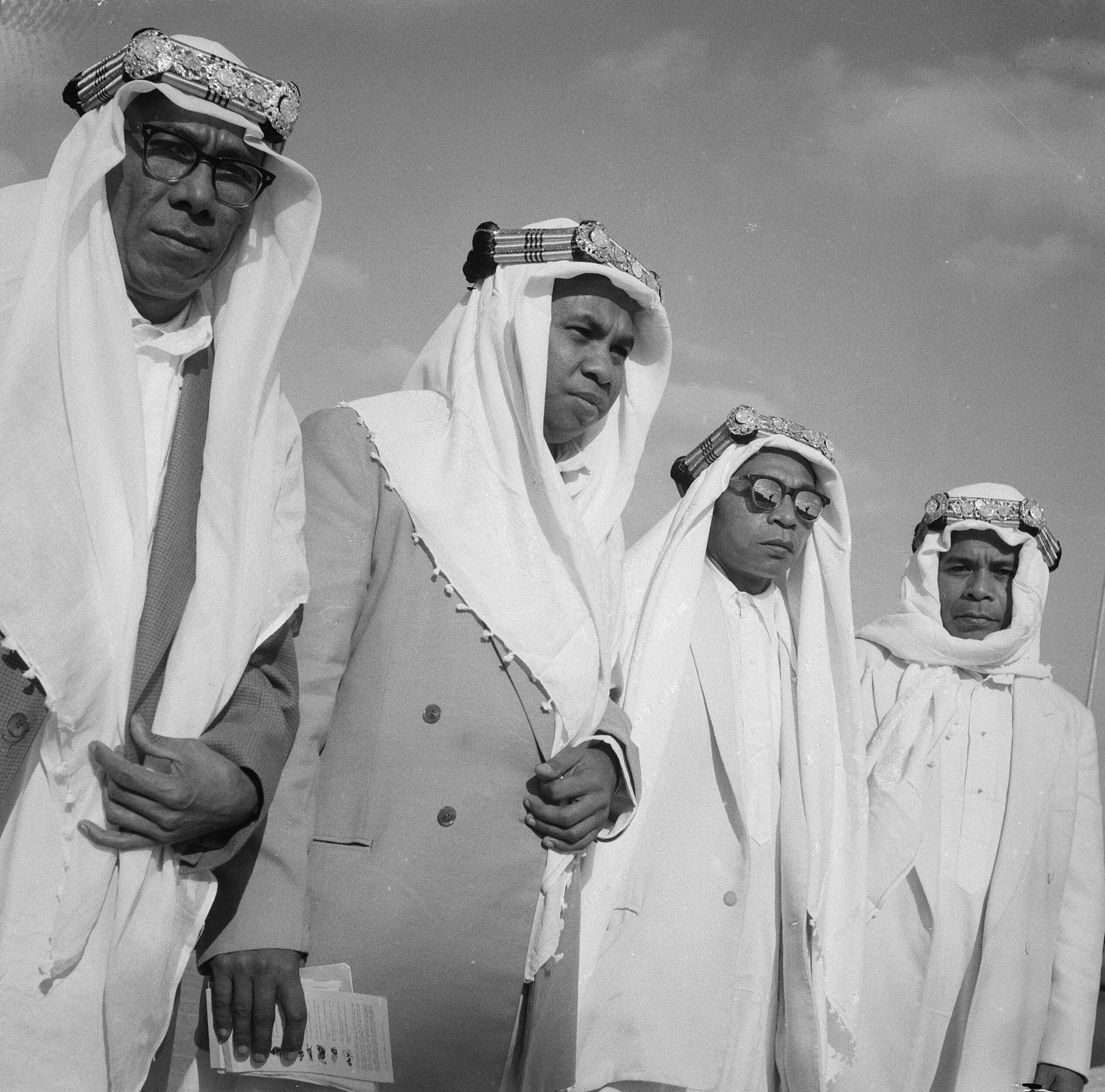 Collectie / Archief : Fotocollectie Anefo Reportage / Serie : [ onbekend ] Beschrijving : Mekkagangers op Schiphol Datum : 14 juni 1961 Locatie : Noord-Holland, Schiphol Trefwoorden : bedevaarten, bedevaartgangers, islam, religie Fotograaf : Nijs, Jac. de / Anefo Auteursrechthebbende : Nationaal Archief Materiaalsoort : Negatief (zwart/wit) Nummer archiefinventaris : bekijk toegang 2.24.01.03 Bestanddeelnummer : 912-6023